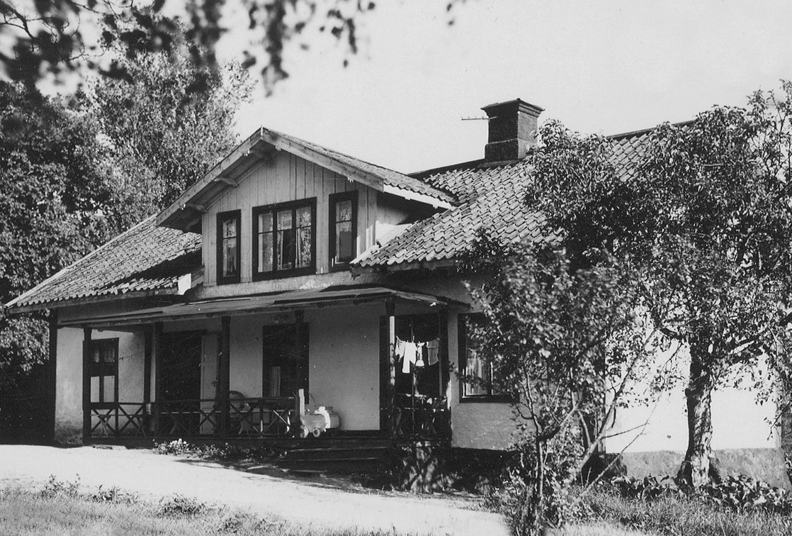 Eklundska gården.